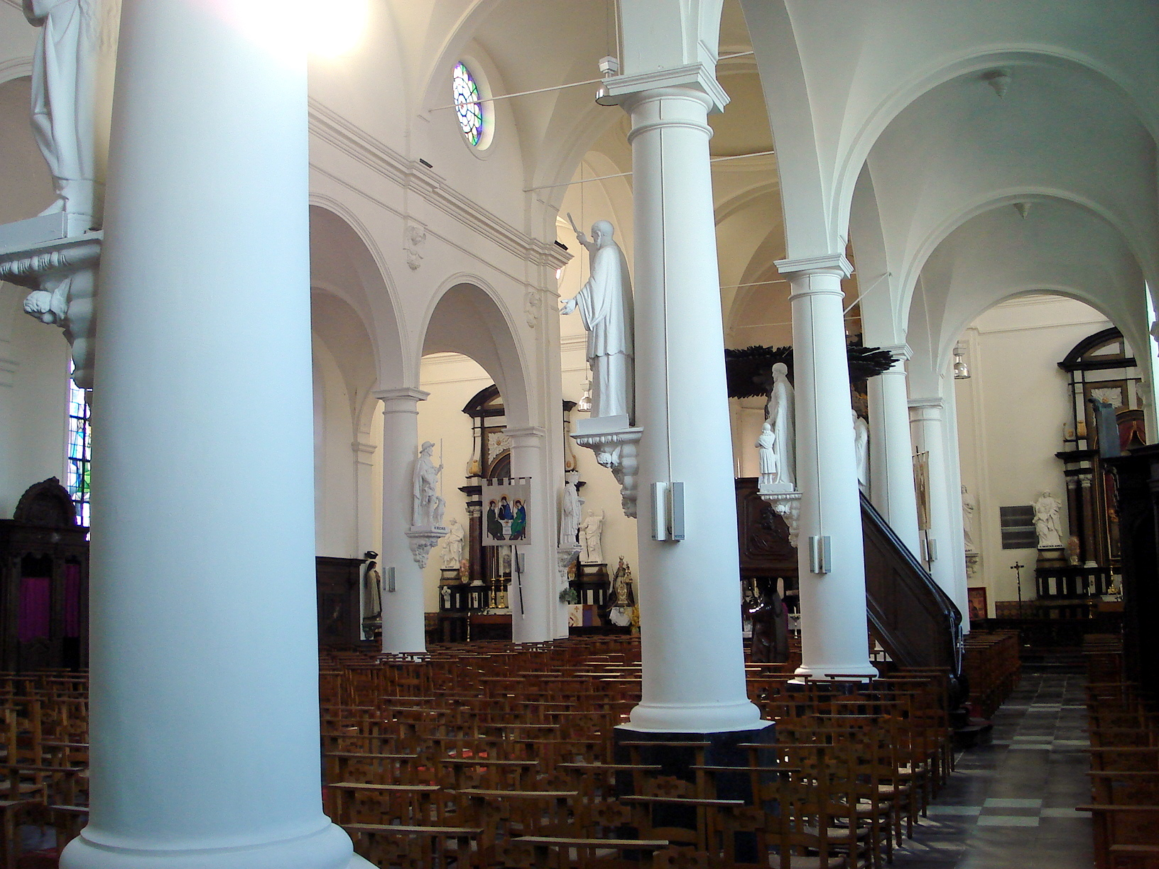 Doel (Oost-Vlaanderen, gem. Beveren). Kerk, vanuit zijbeuk naar koor. Biechtstoel (1774). Beelden (17e tot 20e eeuw). Arch. Lodewijk Roelandt.